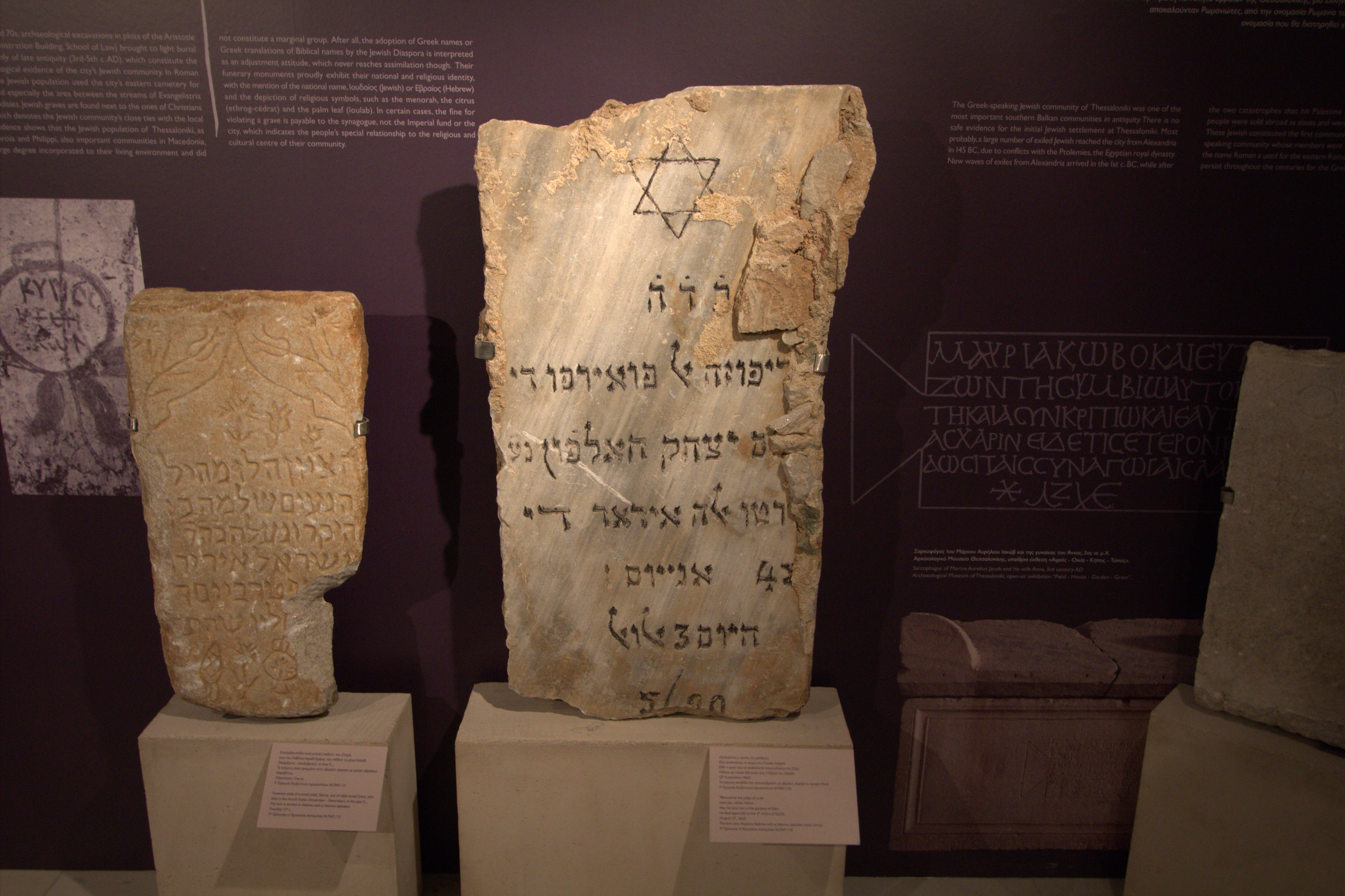 Archaeological Museum of Thessaloniki, Greece. --- Αρχαιολογικό Μουσείο Θεσσαλονίκης.